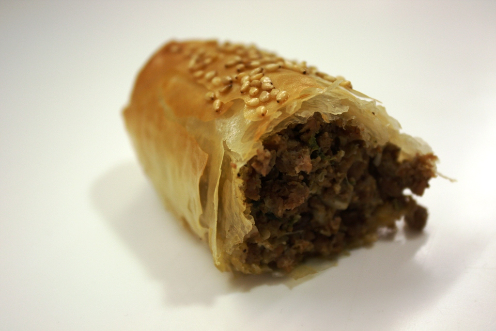 Detalle del Corte del Briouat de Kefta